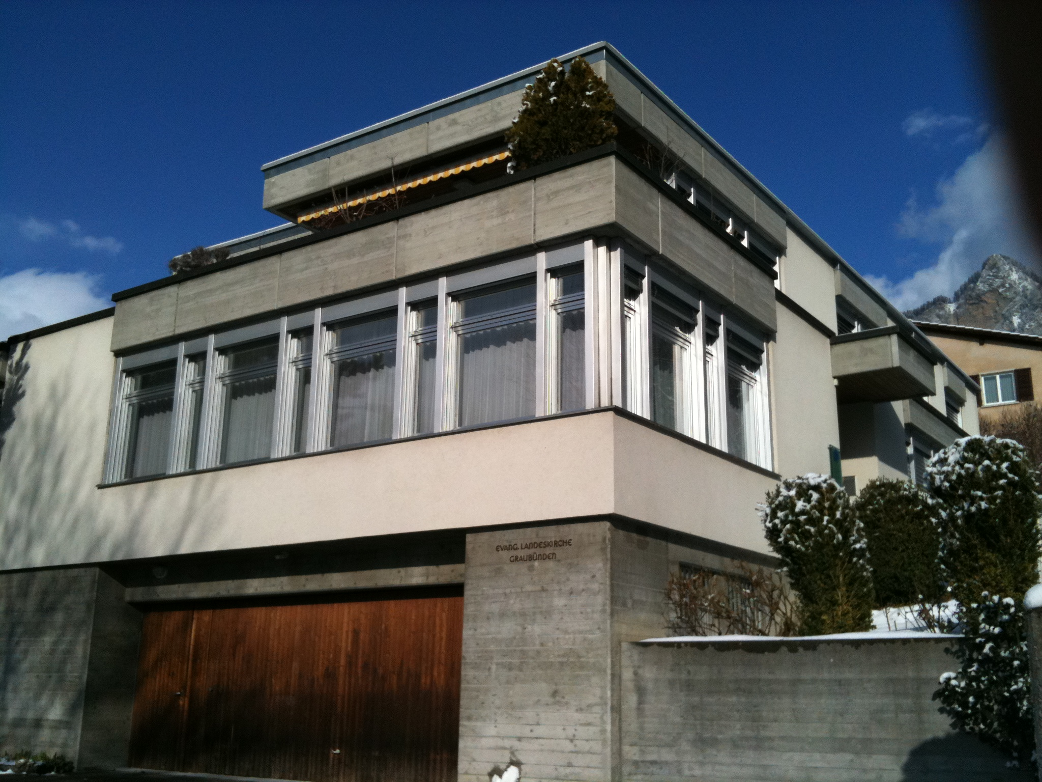 Verwaltungsgebäude der reformierten Bündner Landeskirche in der Loestrasse in Chur